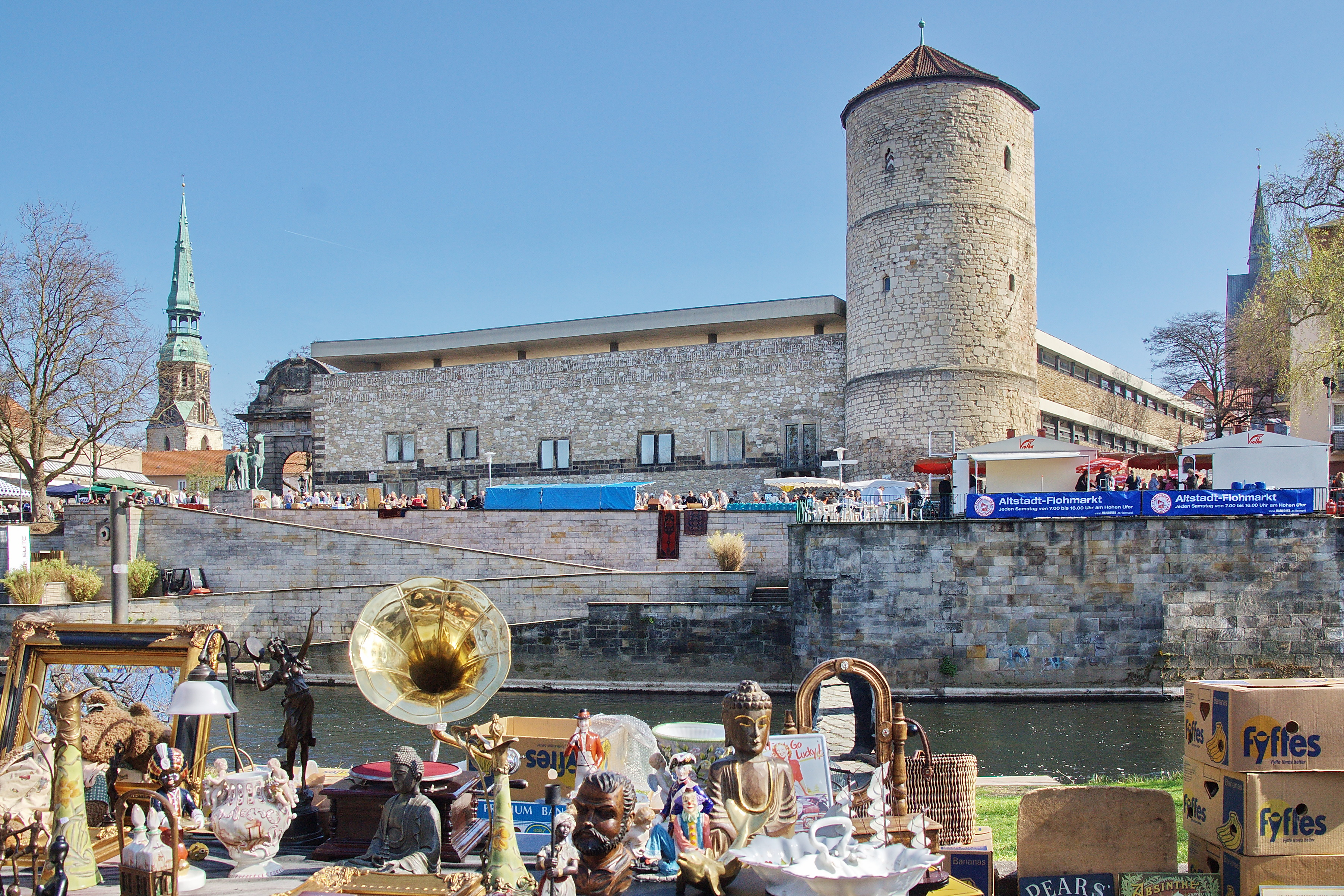 Flohmarkt am Hohen Ufer (Hannover), Niedersachsen, Deutschland